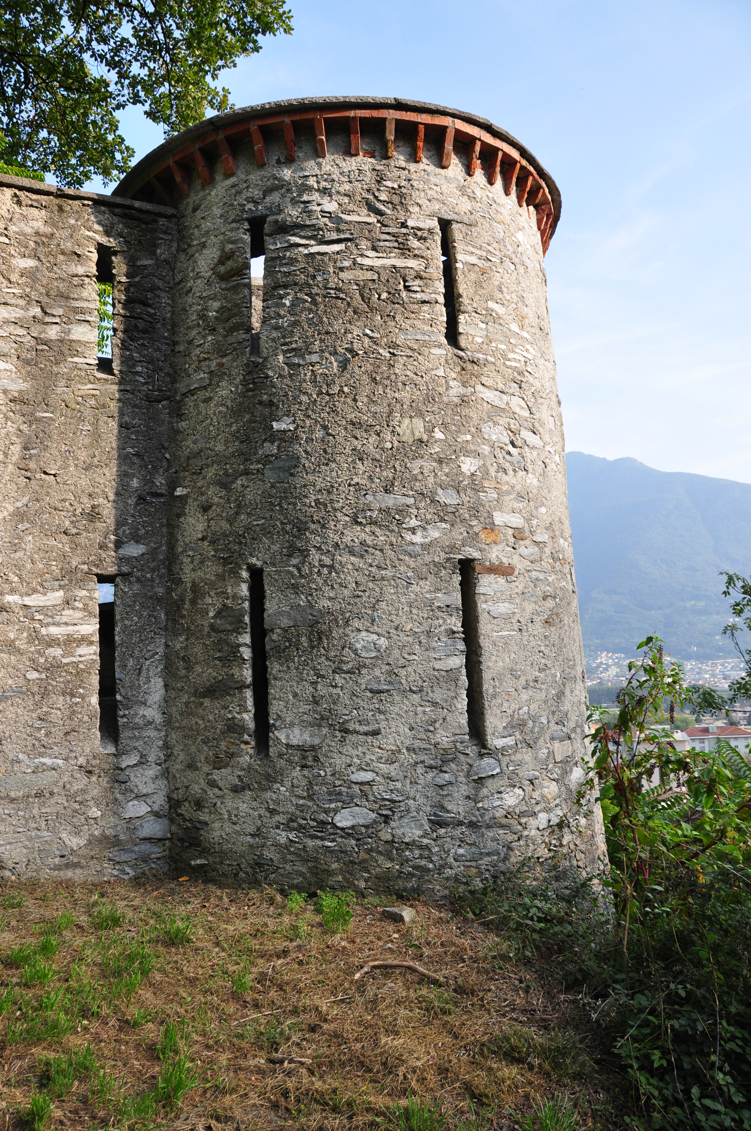 La torre della murata vista dall'esterno.